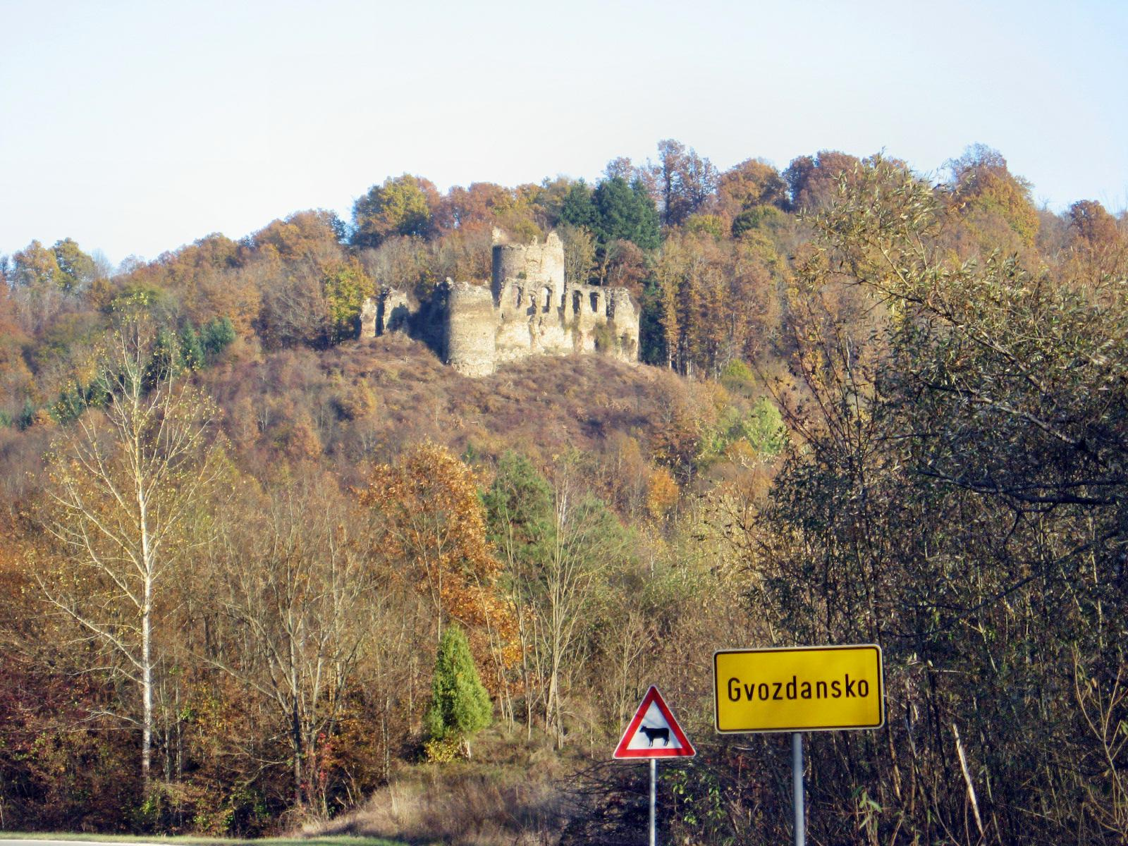 Tvrđava Gvozdansko